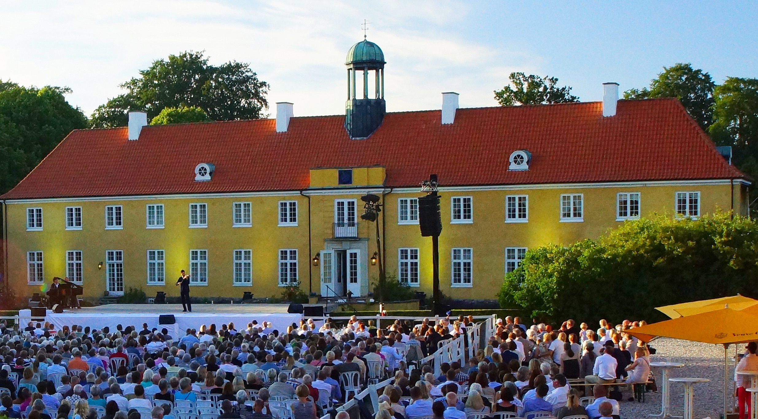 Møllerup Hovedbygningen Verdensballet Juli 2014